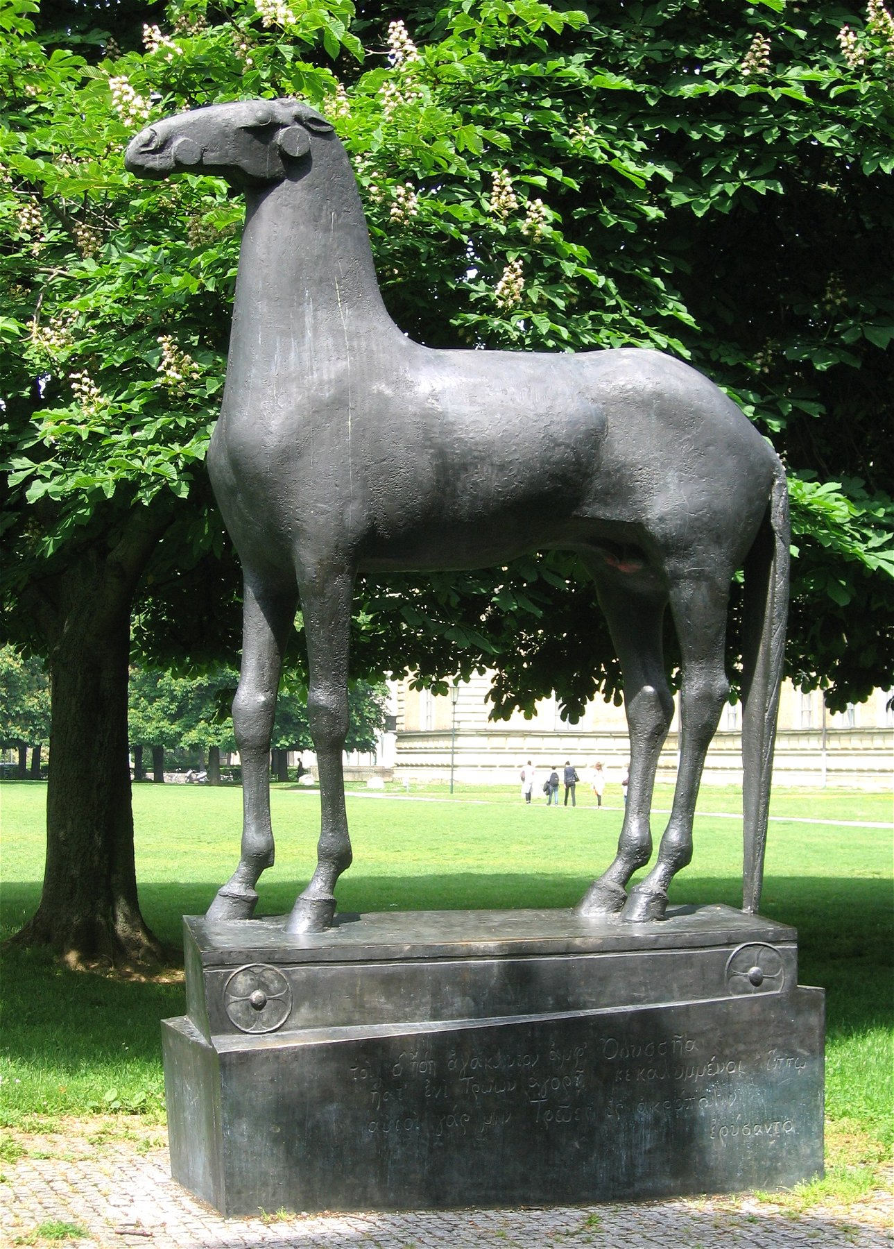 Hans Wimmer: Trojanisches Pferd, 1976-1981, Bronze, in München an der Alten Pinakothek